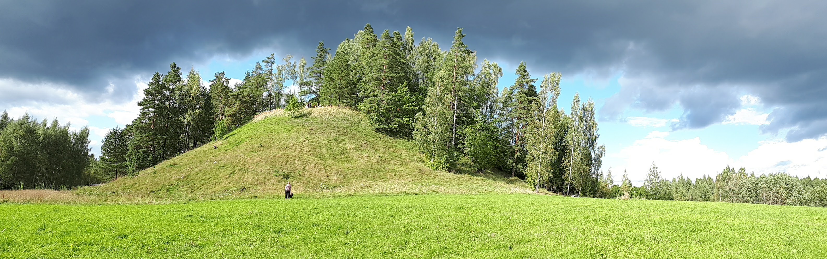 Sudrabkalns - pilskalns, Sēlpils pagasts